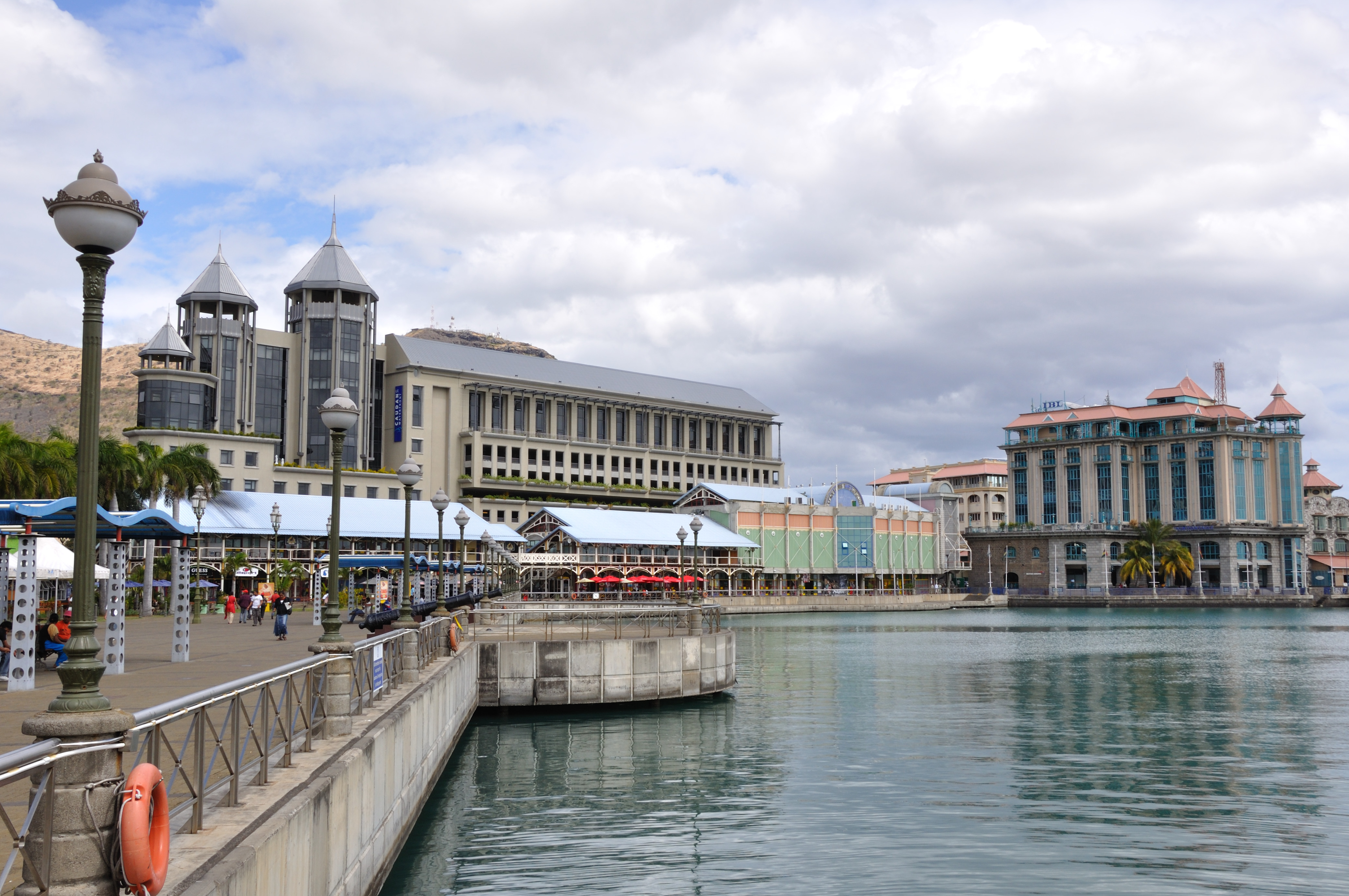 Mauritius, Port Louis